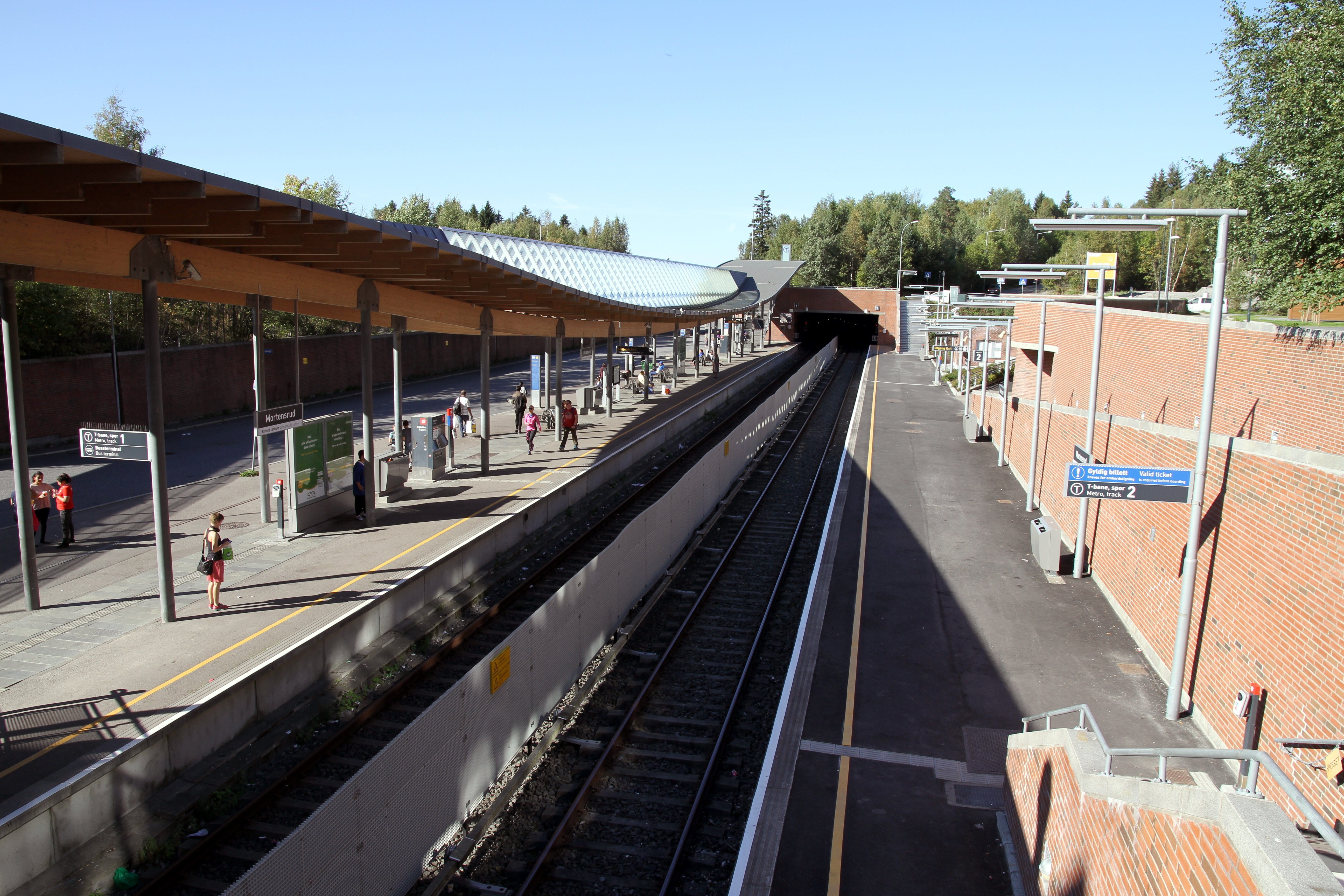 Mortensrud stasjon i Oslo.